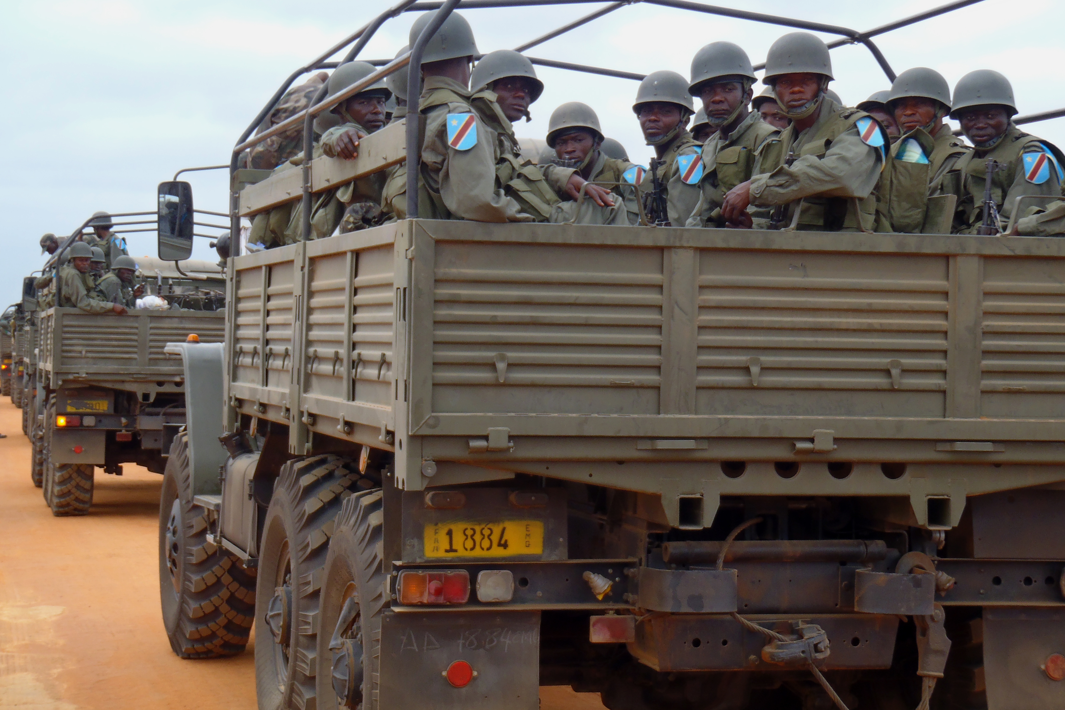 Ural-4320 trucks during Kwanza 2010.